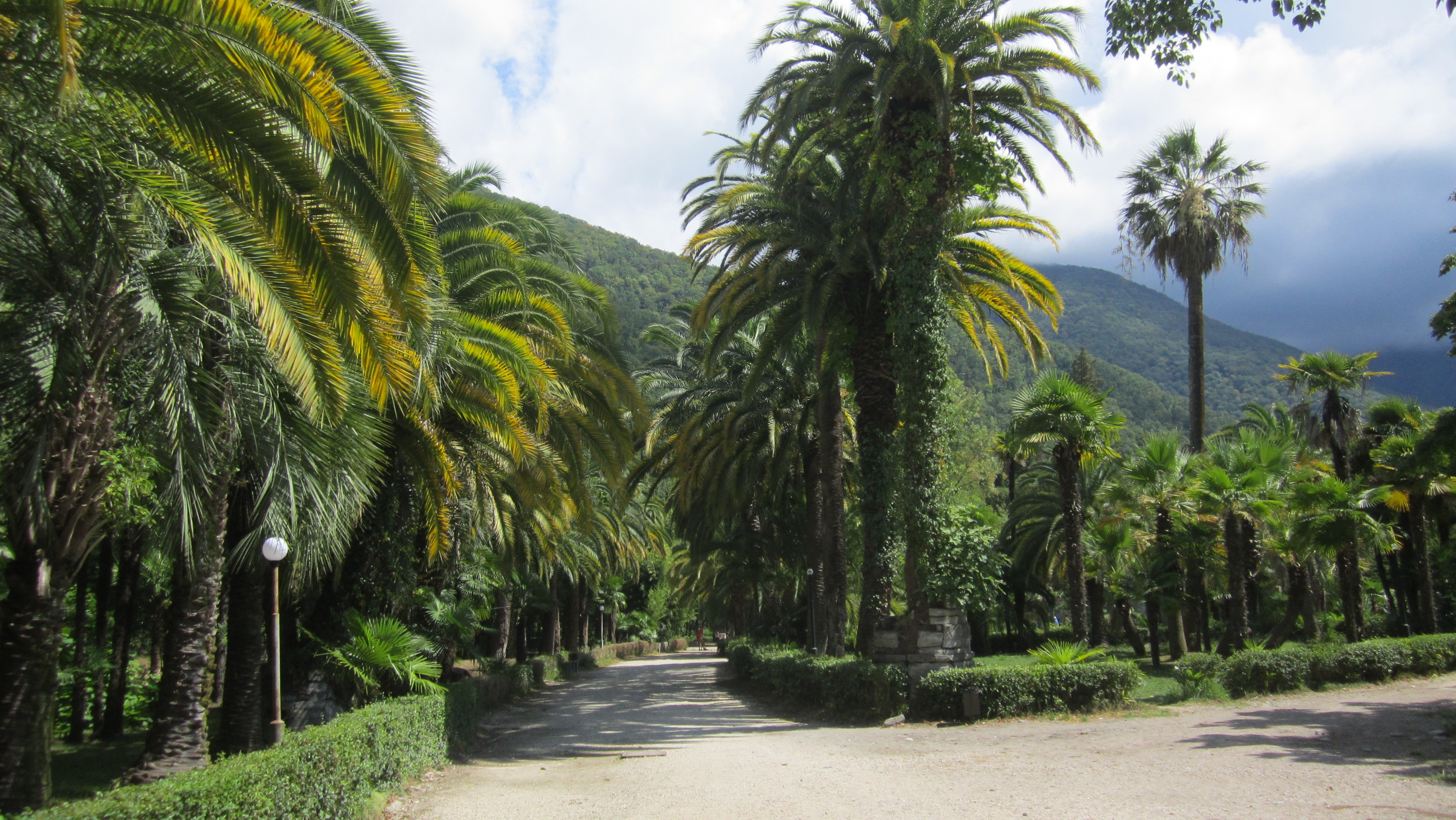 Приморский парк в Гаграх, Абхазия